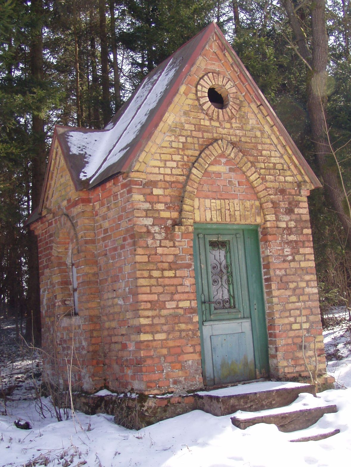 Polom - kaple na křižovatce cest do Sedloňova, Olešnice a Sněžného